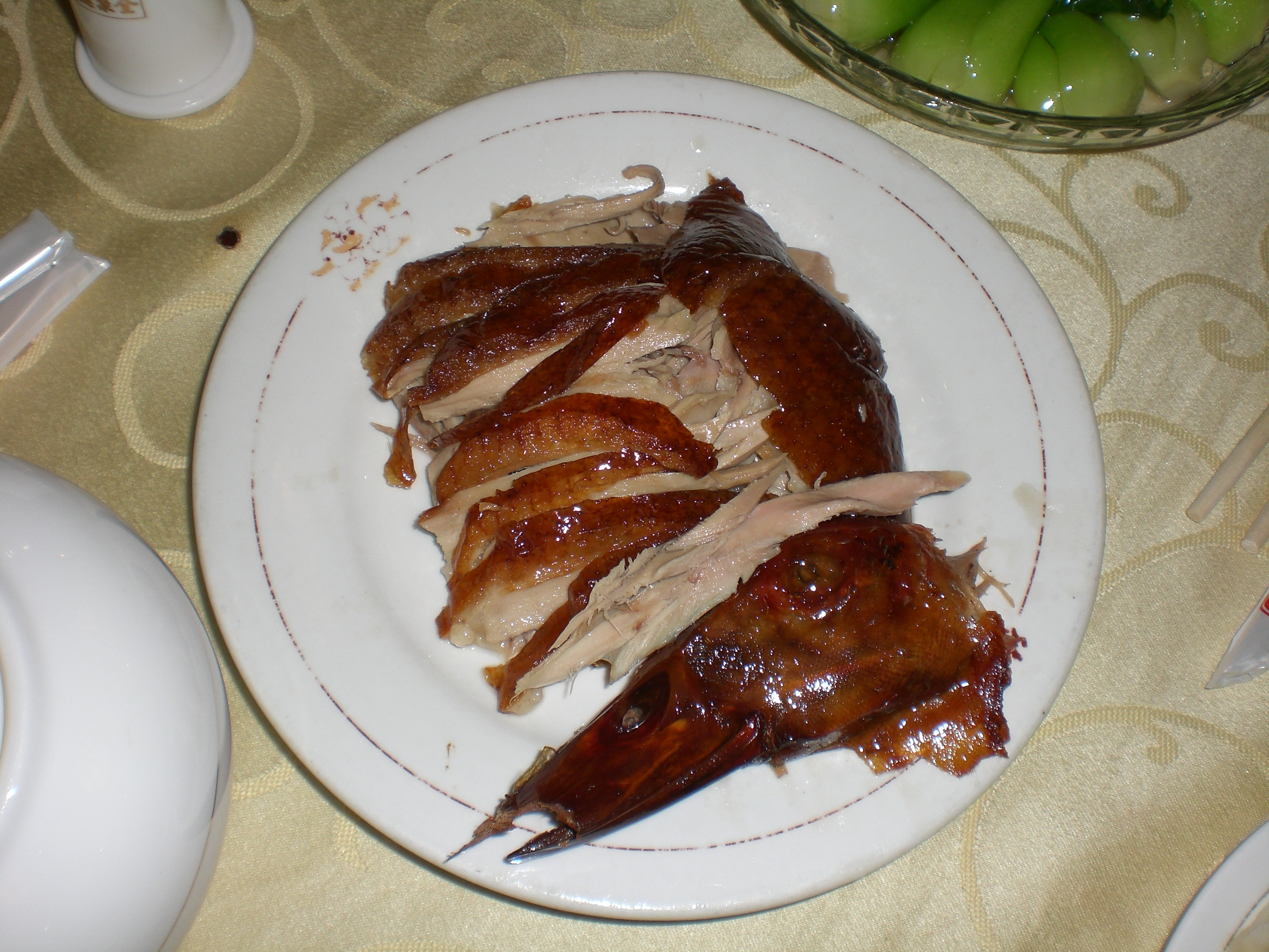 Peking Duck, in a restaurant in Peking